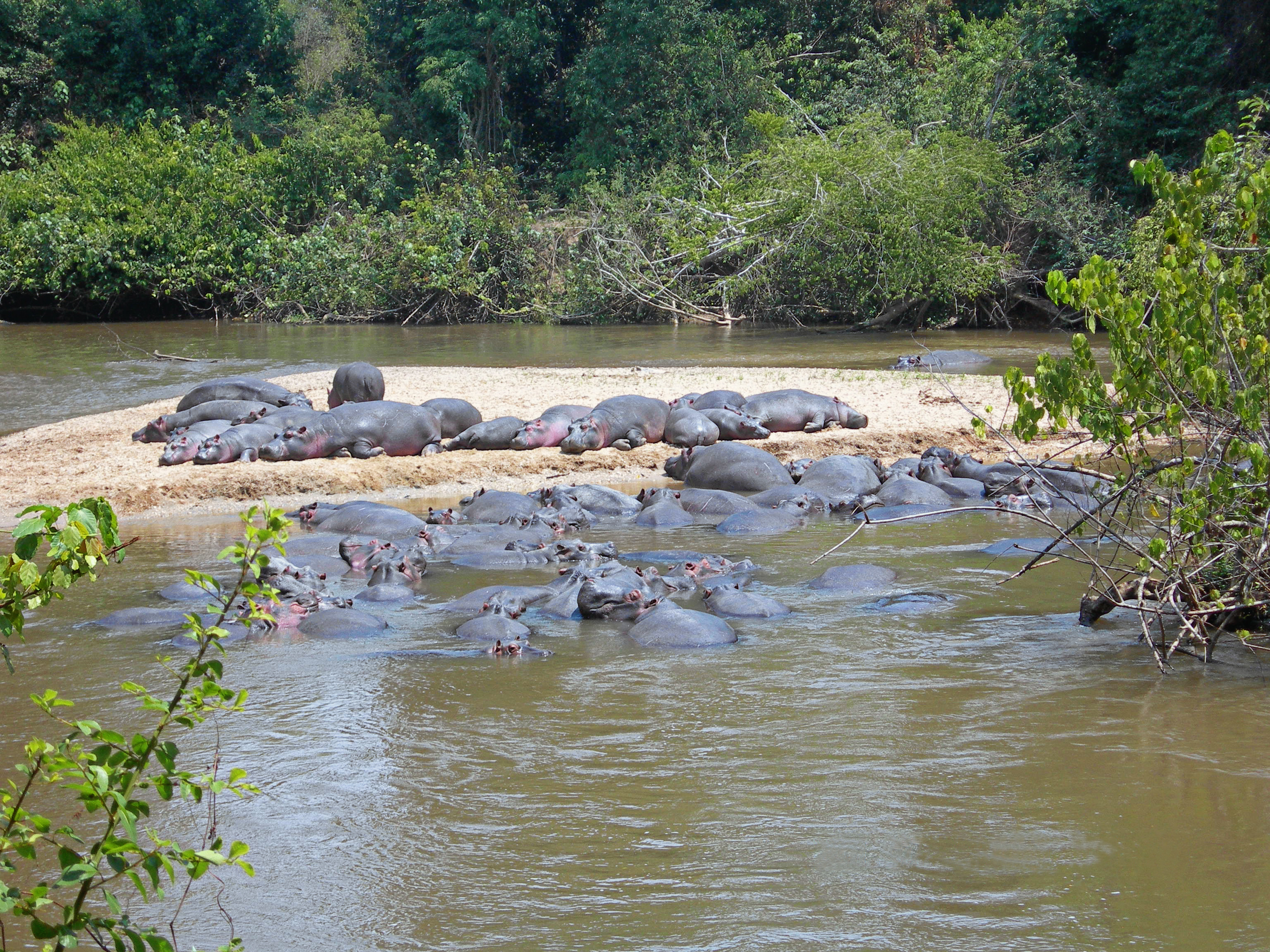 Flusspferde (Hippopotamus amphibius) auf einer Sandbank vom Queen-Elizabeth-Nationalpark (Uganda) aus gesehen. (Der Fluss Ishasha liegt an dieser Stelle bereits auf dem Gebiet der Demokratischen Republik Kongo.)